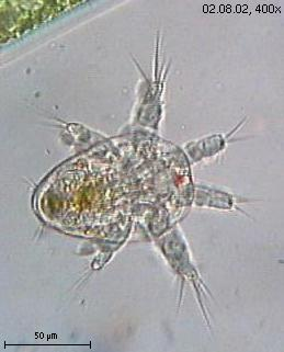 Nauplius eines Ruderfußkrebses